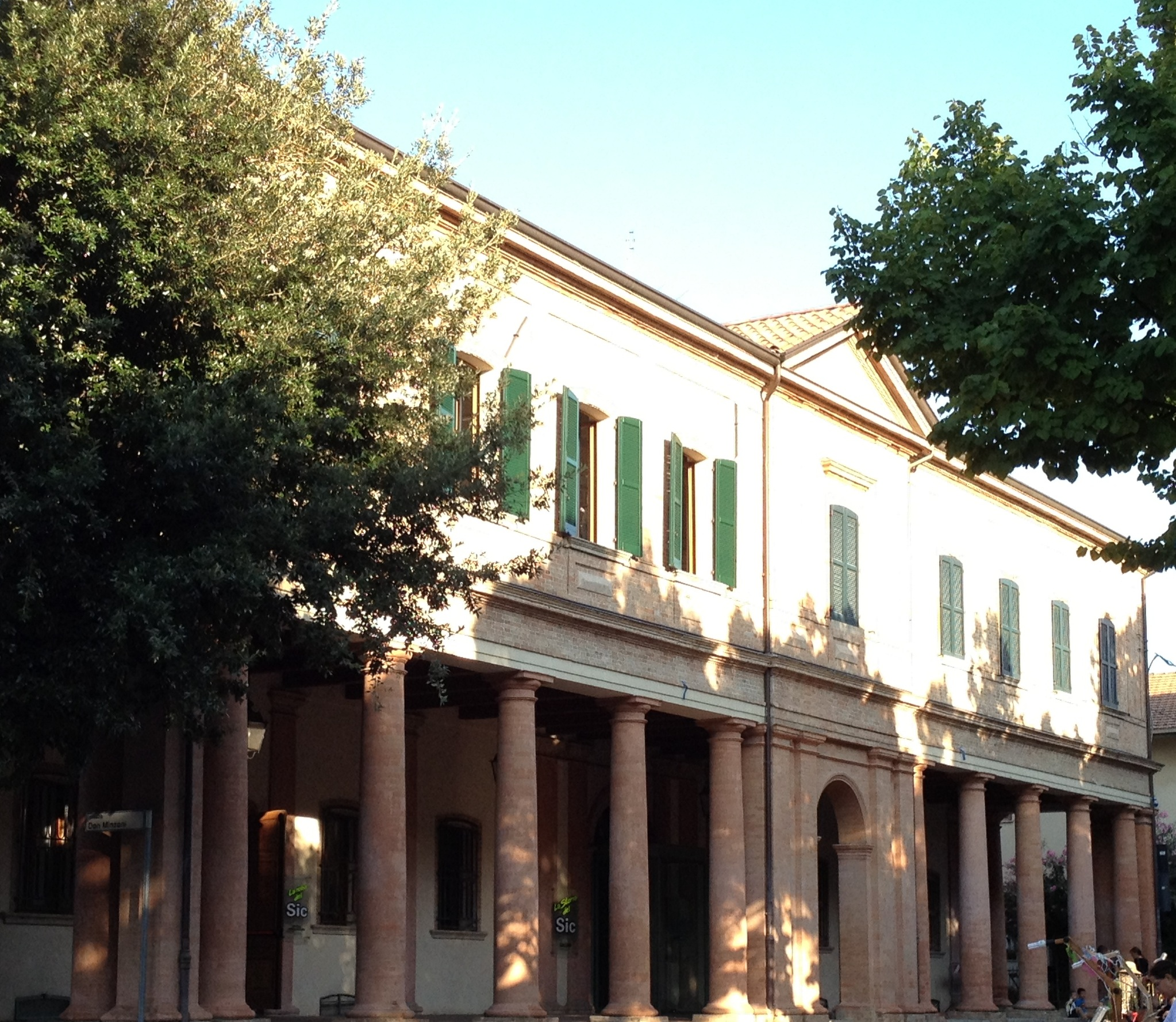 Il teatro CorTe, risalente al 1907 e completamente ristrutturato fra il 1992 e il 2008